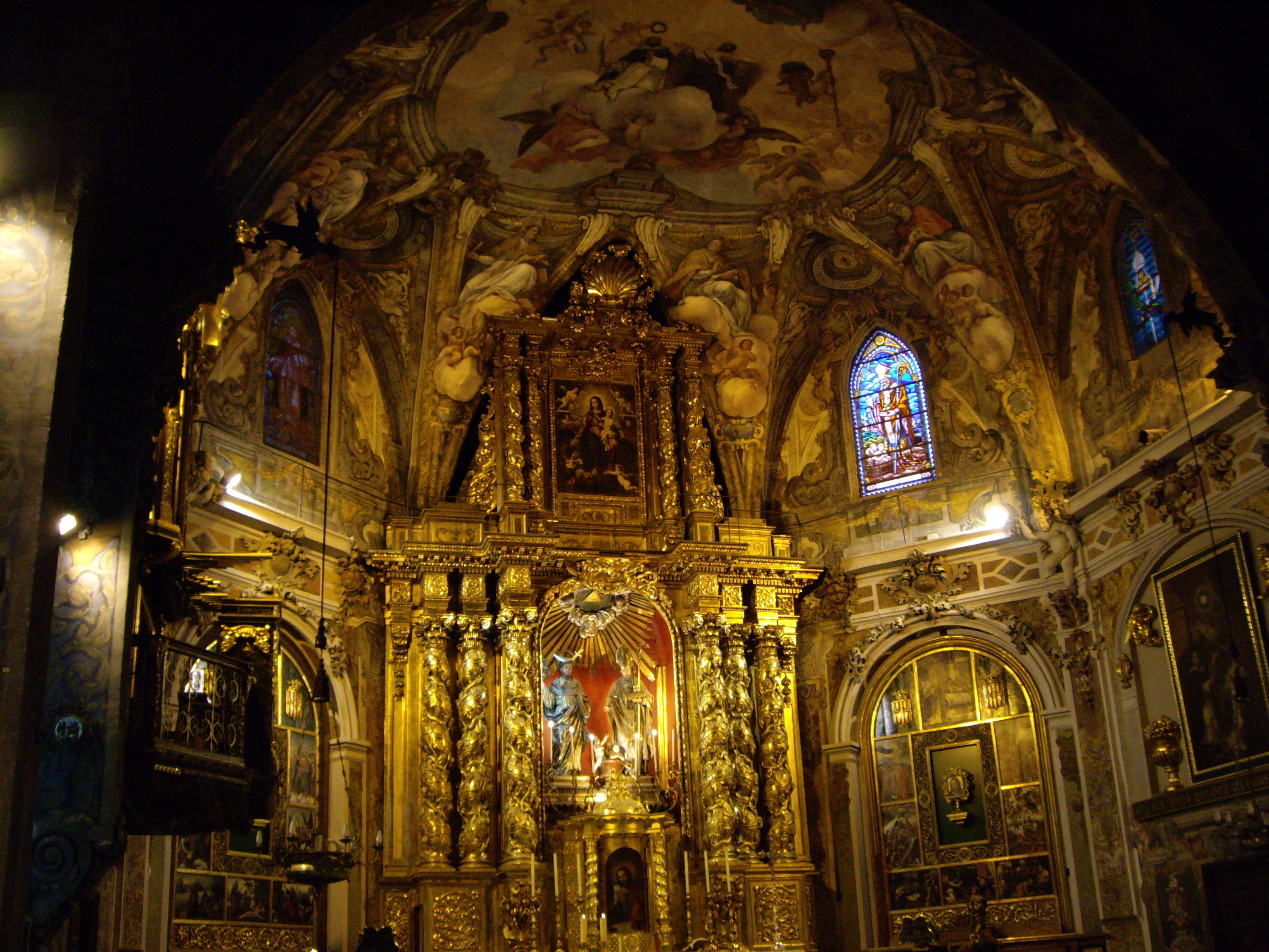 Altar major de l'església de Sant Nicolau de València, l'Horta, País Valencià.